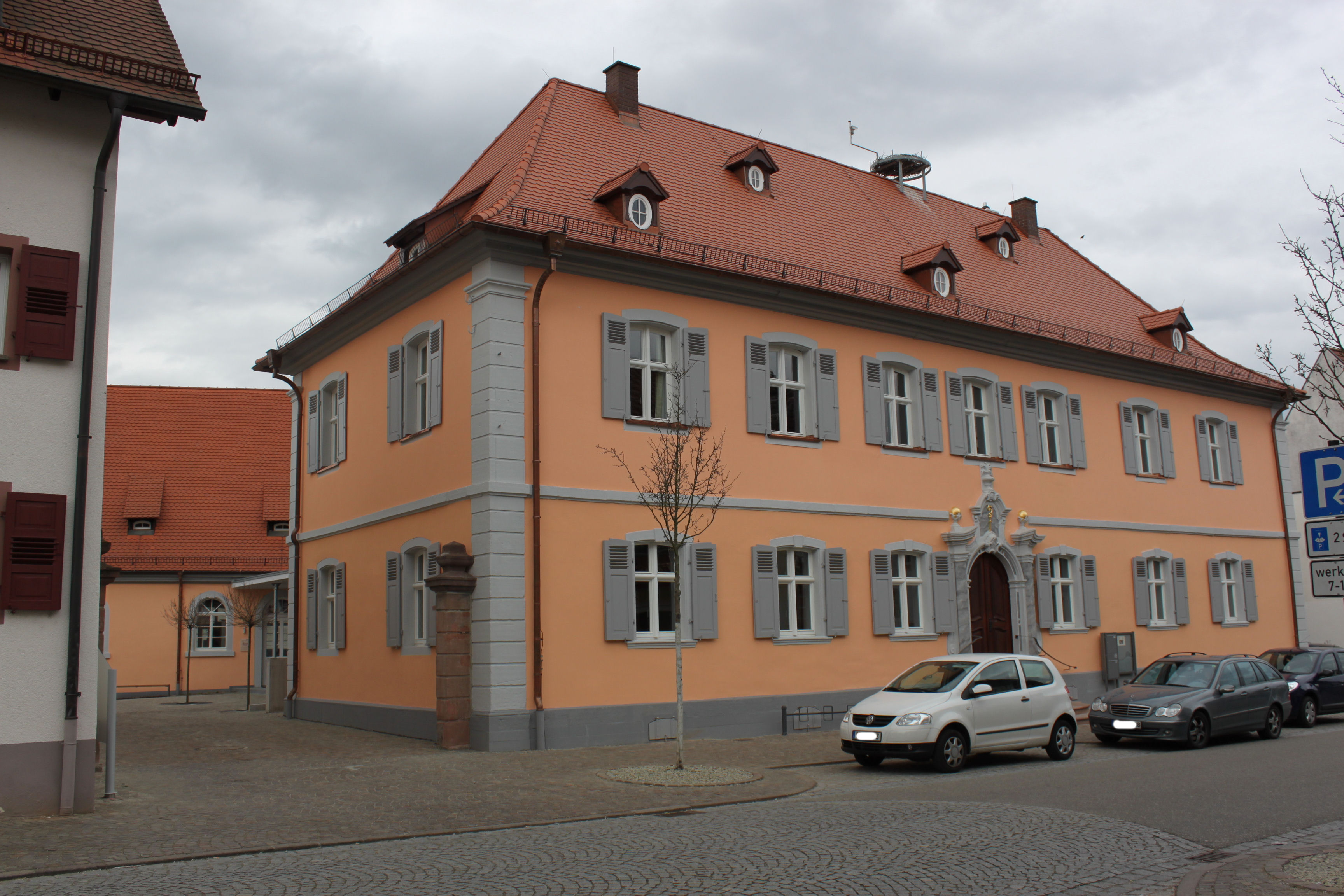 Ehemaliger Verwaltungssitz des Abtes von Ettenheim; danach Schule; jetzt Bürgerhaus "Alte Schule" mit Archäologischem Museum im Hintergebäude